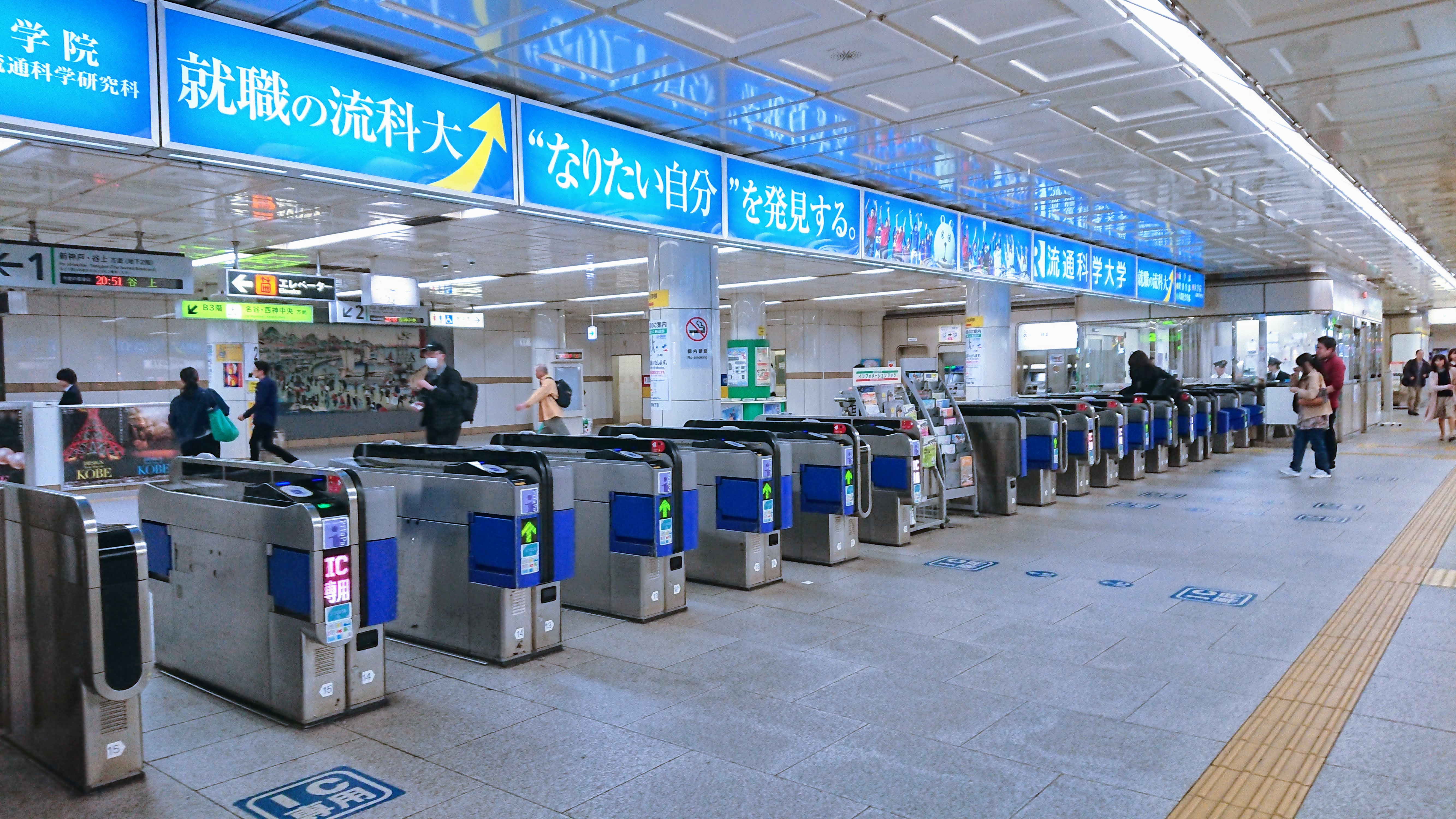 神戸市交通局（神戸市営地下鉄）山手線（西神・山手線）S03 三宮駅 東改札口